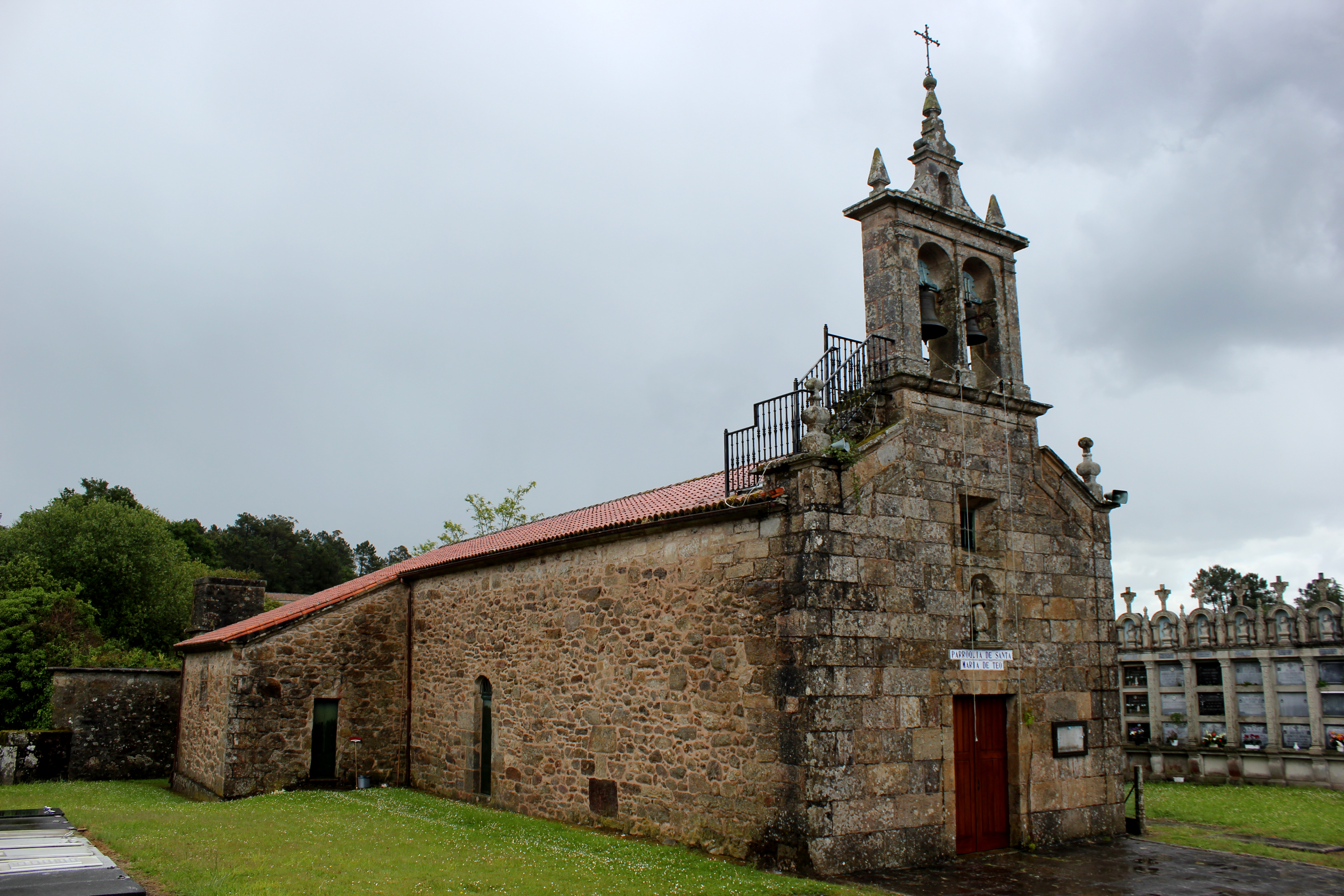 Igrexa de Santa María de Teo